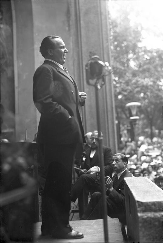 Gitta Alpar und Richard Tauber singen auf einem Wohltätigkeits-Matiné für die Künstleraltershilfe im Berliner Zoo ! Richard Tauber der berühmte deutsche Kammer Sänger, singt auf dem Wohltätigkeits-Matiné im Zoologischen Garten.